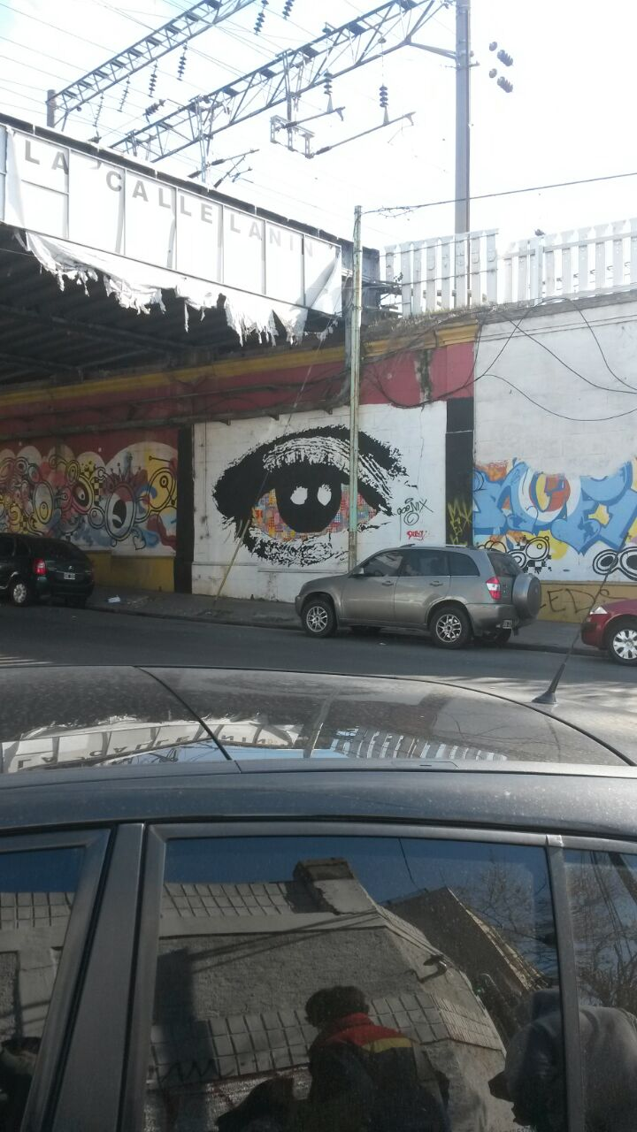 La imagen muestra un estilo de arte conocido como graffiti. Este se en la ciudad Autónoma de Buenos Aires, en el barrio de Barracas, en la calle Brandsen. En esta zona se puede contemplar un pasaje lleno de este arte urbano o arte callejero. También se encuentran otros estilos como el bubble leters (que consiste en letras pompas redondeadas que son gruesas y grandes con colores simples), el mural ( piezas abstractas de grandes dimensiones pintadas con brocha o spray) y block letters.